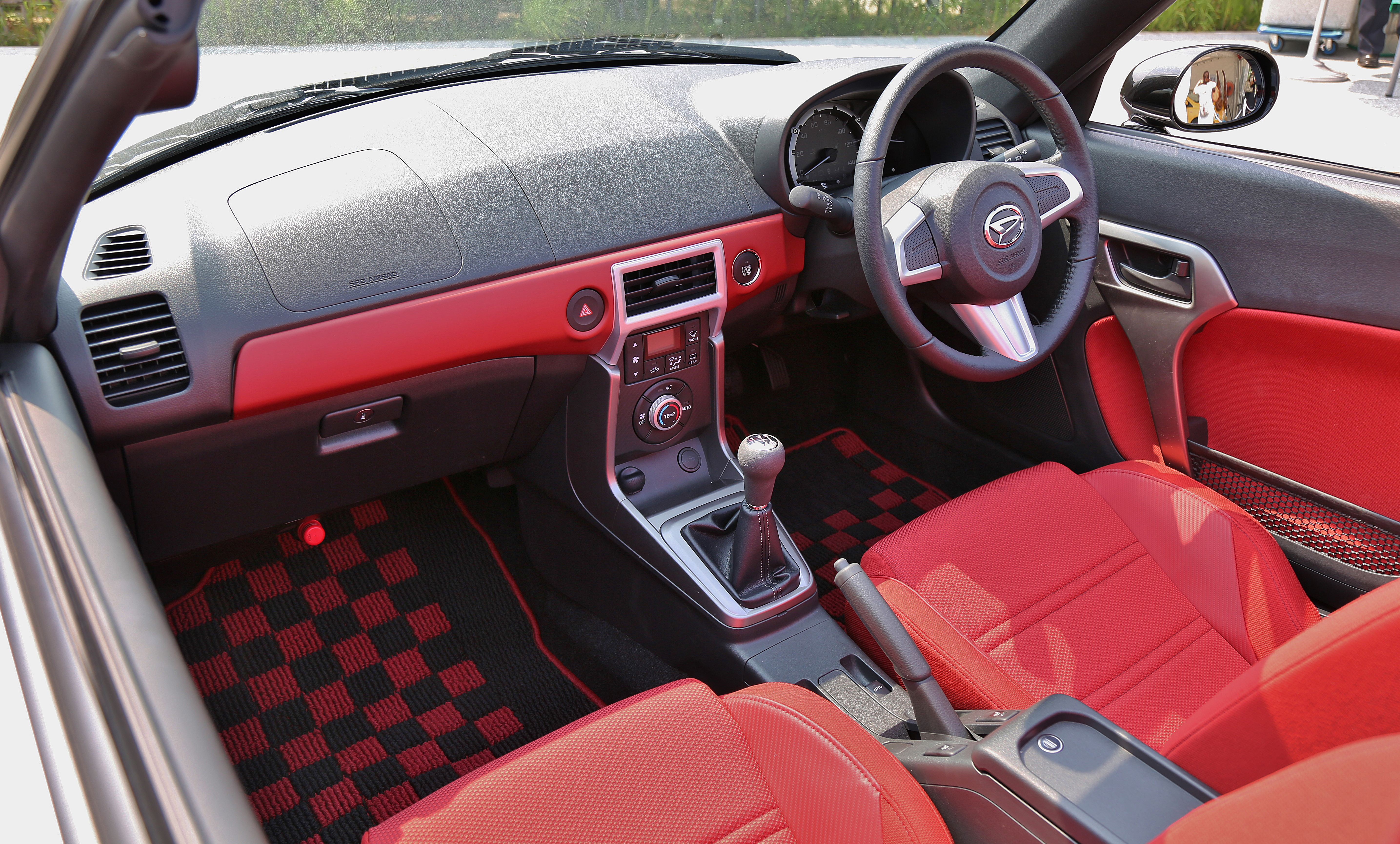 Daihatsu Copen Cero